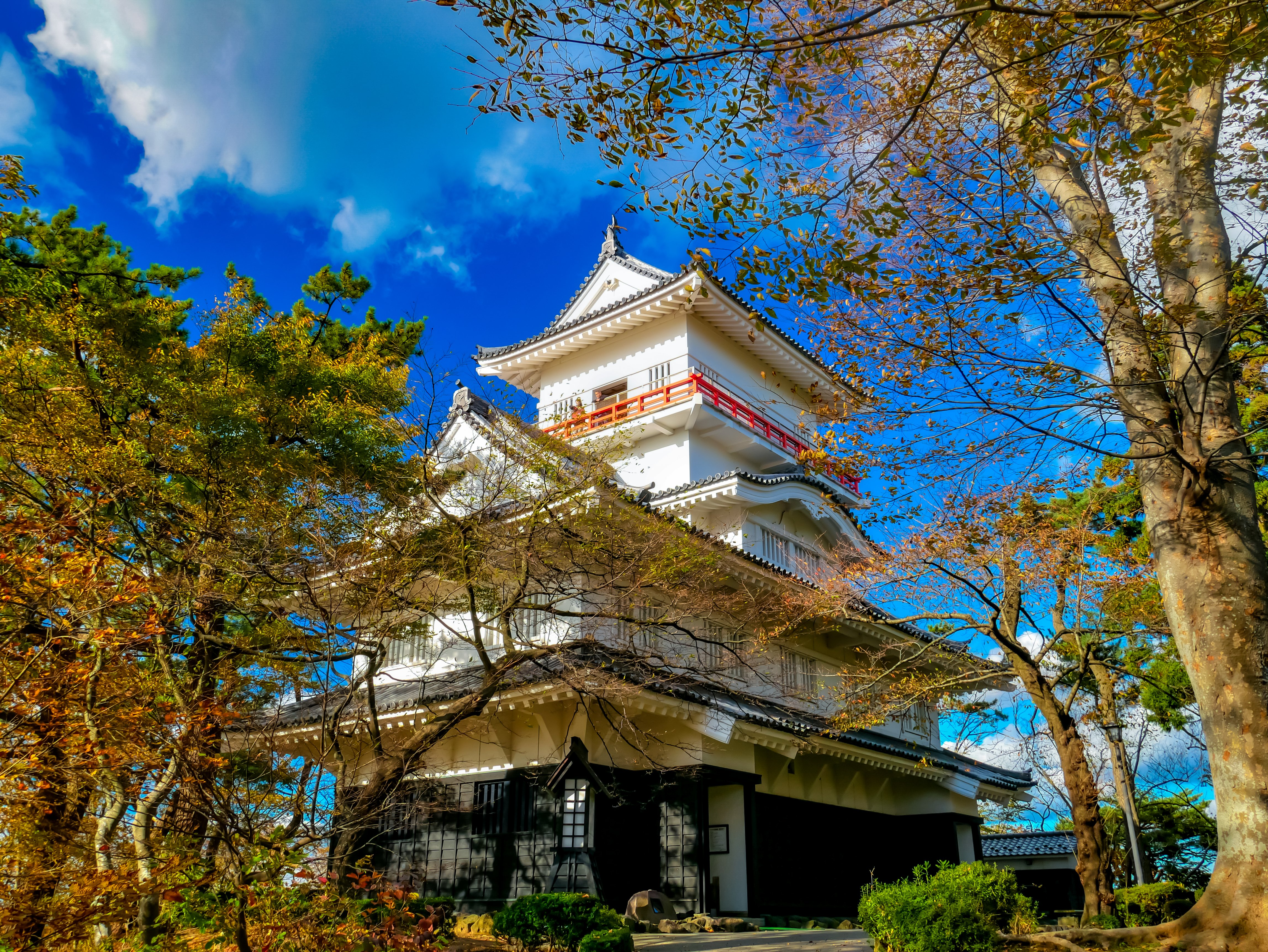 秋田県秋田市、千秋公園、久保田城御隅櫓 Panasonic Lumix DMC-GX7 Mark II